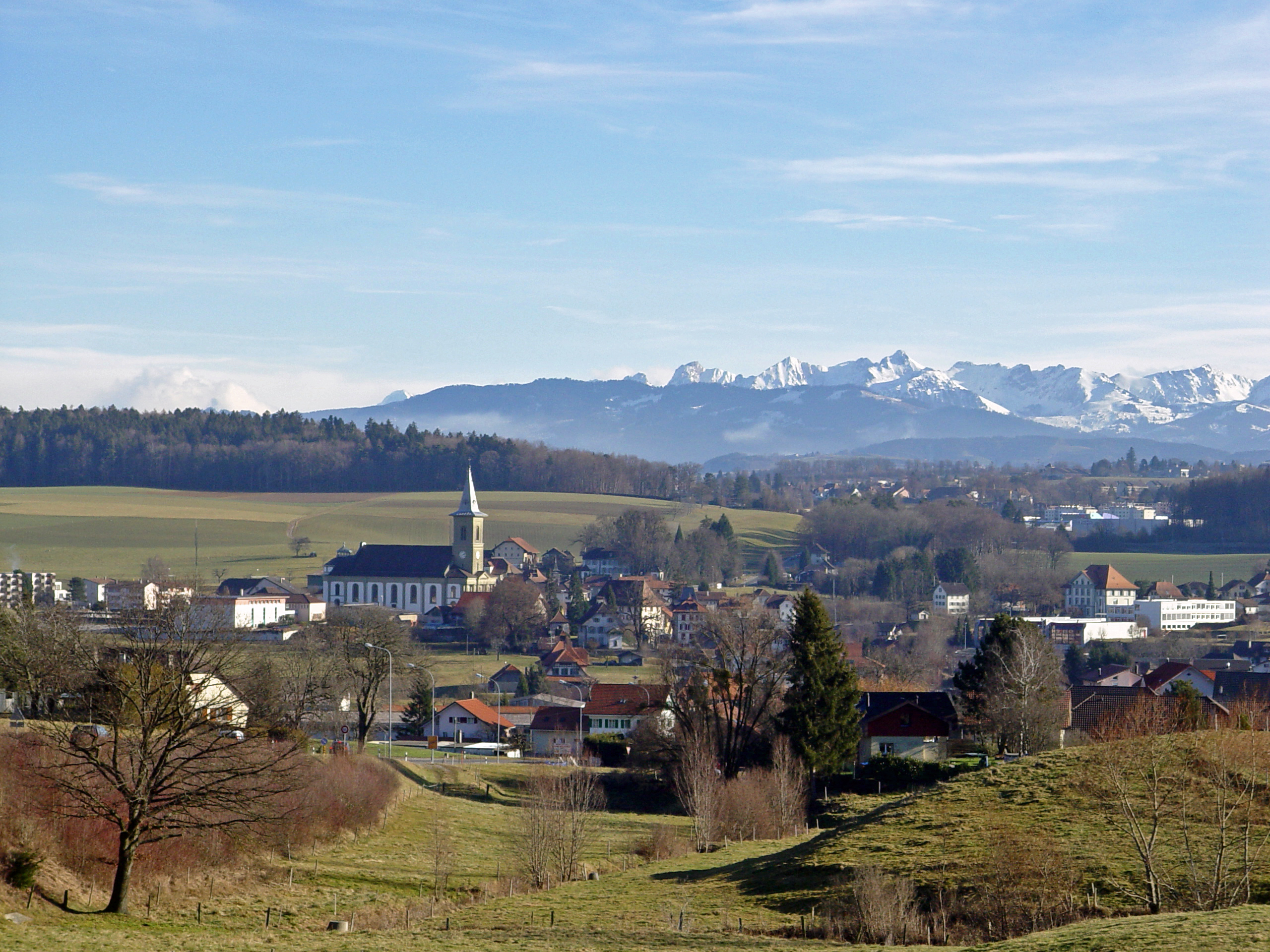 Belfaux (Kanton Fribourg, Schweiz) vom Südewesten fotografiert. Foto Januar 2008 von Yesuitus2001 23:36, 11. Jan. 2008 (CET)